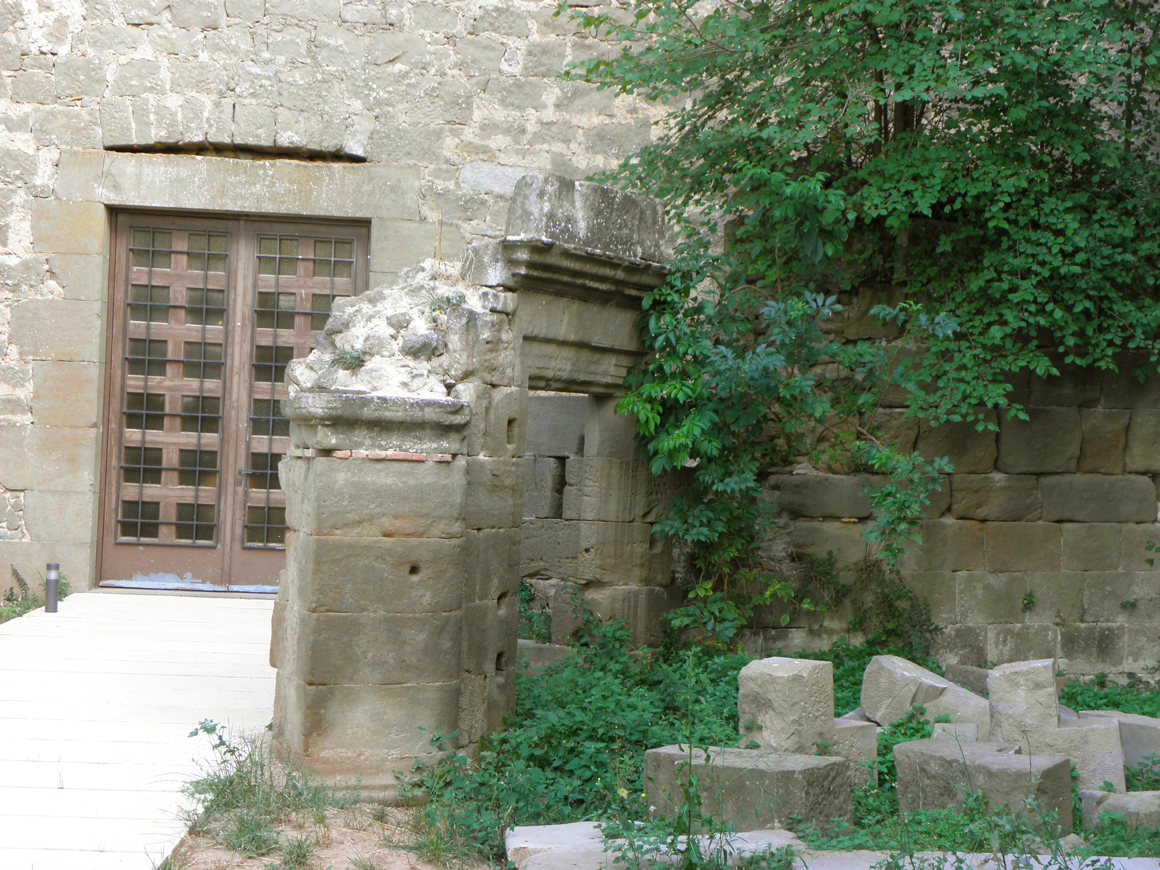 Santuari del Miracle (Riner, Solsonès). Restes de la segona església (d'estil gòtic) del santuari.